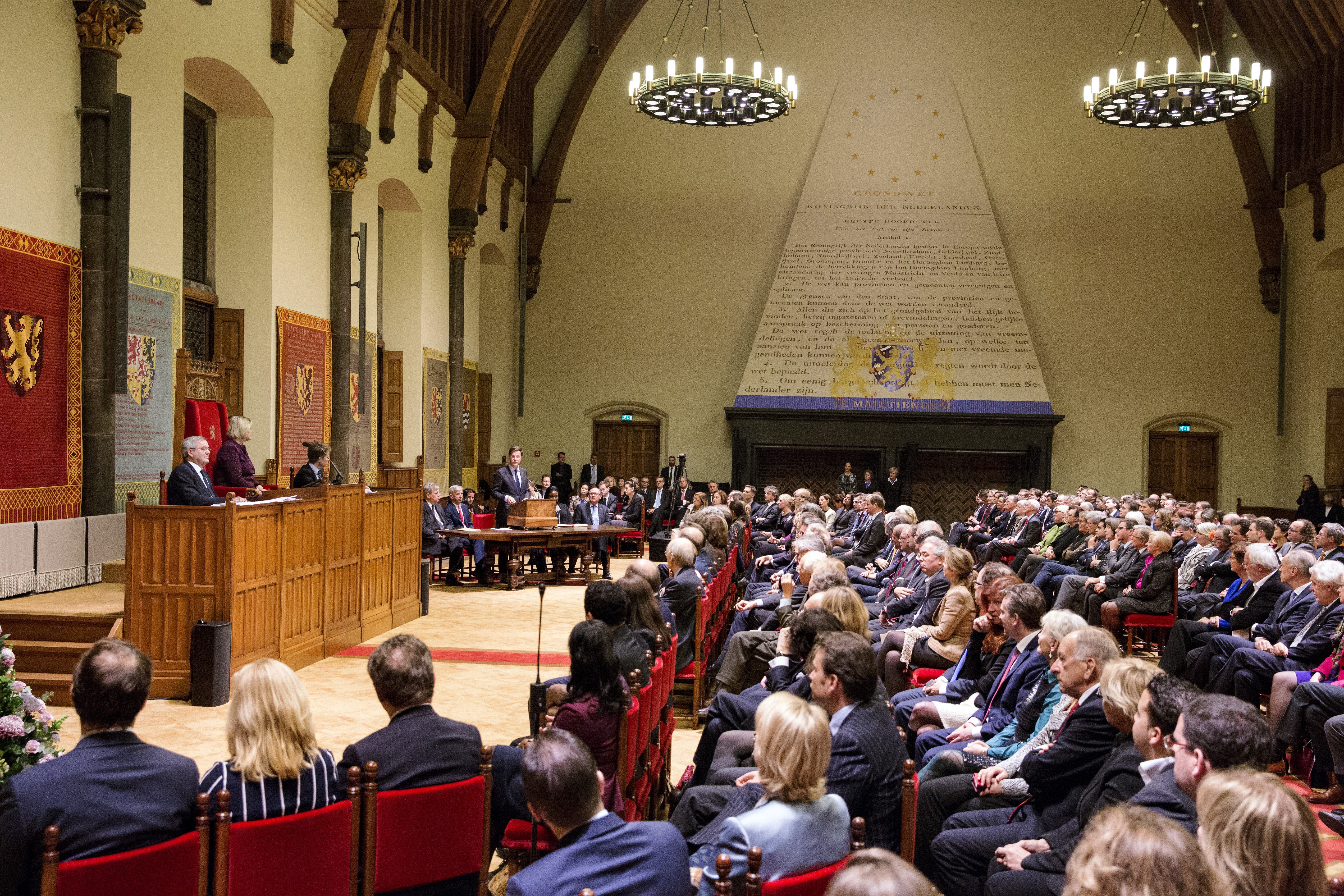 Koningin Máxima wordt zo nodig regentes van het Koninkrijk. Dat is vanmiddag tijdens de Verenigde Vergadering van de Staten-Generaal besloten. De leden van Eerste en Tweede Kamer zijn speciaal voor deze gelegenheid in een verenigde vergadering bij elkaar gekomen in de Ridderzaal. Meer informatie